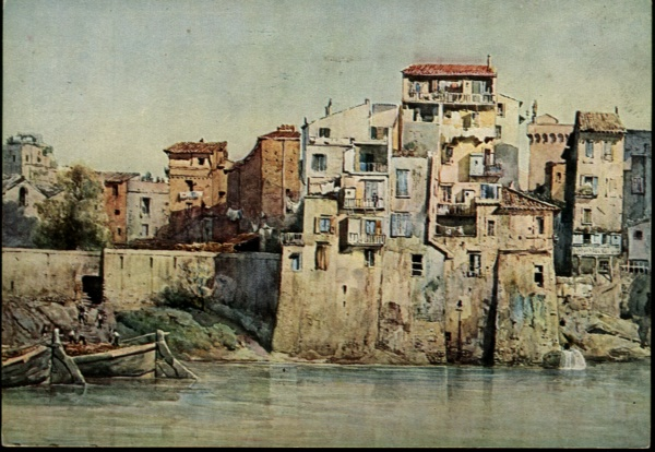 Il Tevere a Monte Brianzo in Rome (rione Ponte)